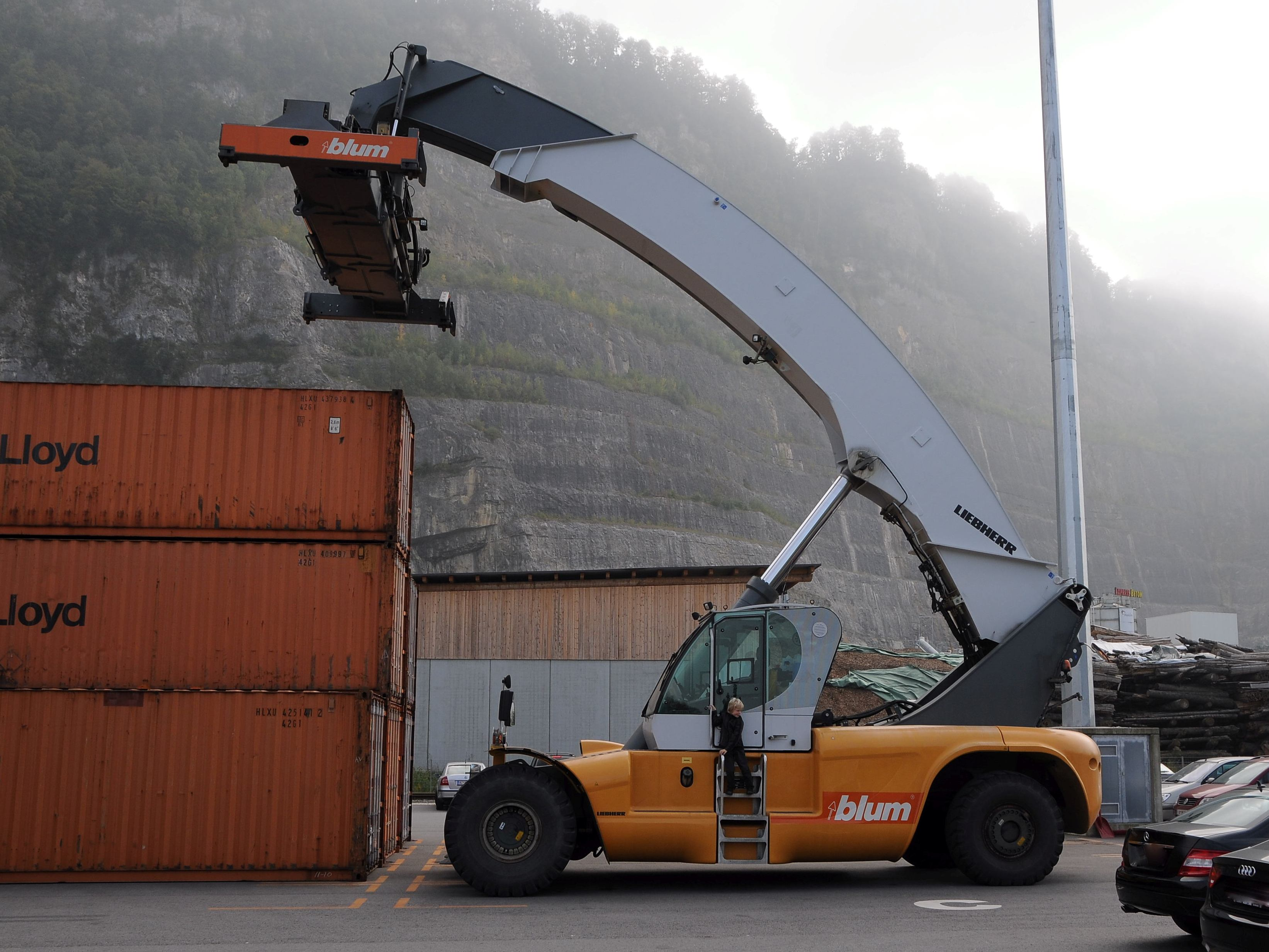 Liebherr LRS 645 Reachstacker Containerstapler. Reach-Stacker sind Flurförderzeuge, die zum Stapeln und Umschlagen von Containern und Wechselbrücken vor allem im kombinierten Verkehr dienen. Es handelt sich um schwere Radfahrzeuge mit bis zu 50 Tonnen Hublast und bis rund 100 Tonnen Eigenmasse. Gesehen in Dornbirn.